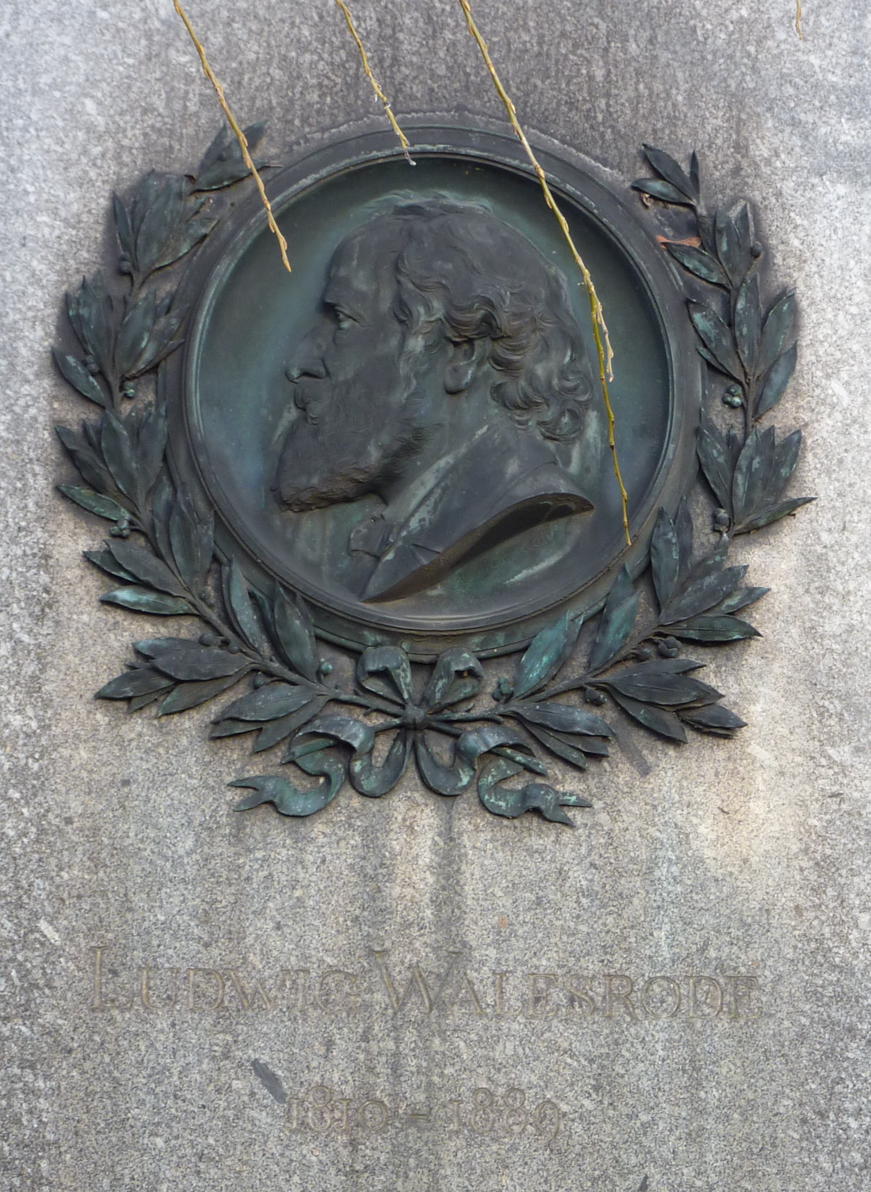 Bildnis Ludwig Walesrodes auf seinem Grabstein von Adolf von Donndorf